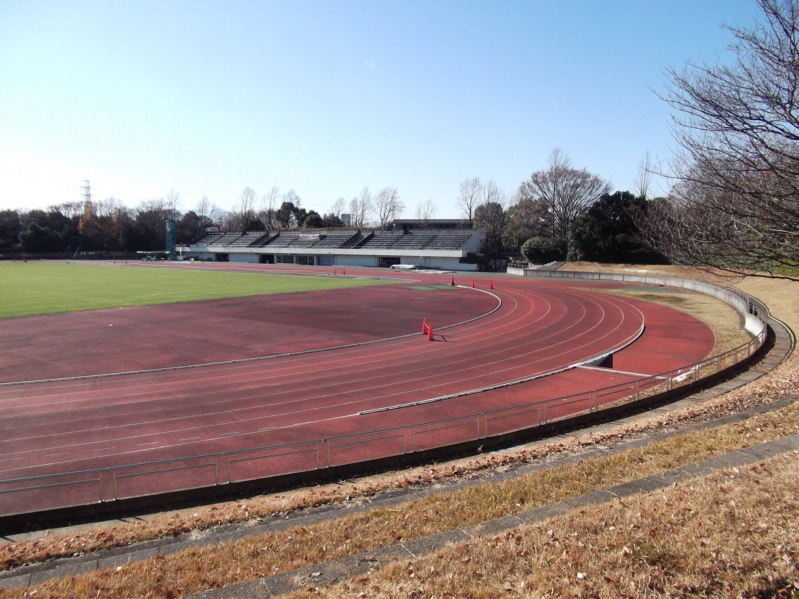 多摩市立陸上競技場。東京都多摩市諏訪。